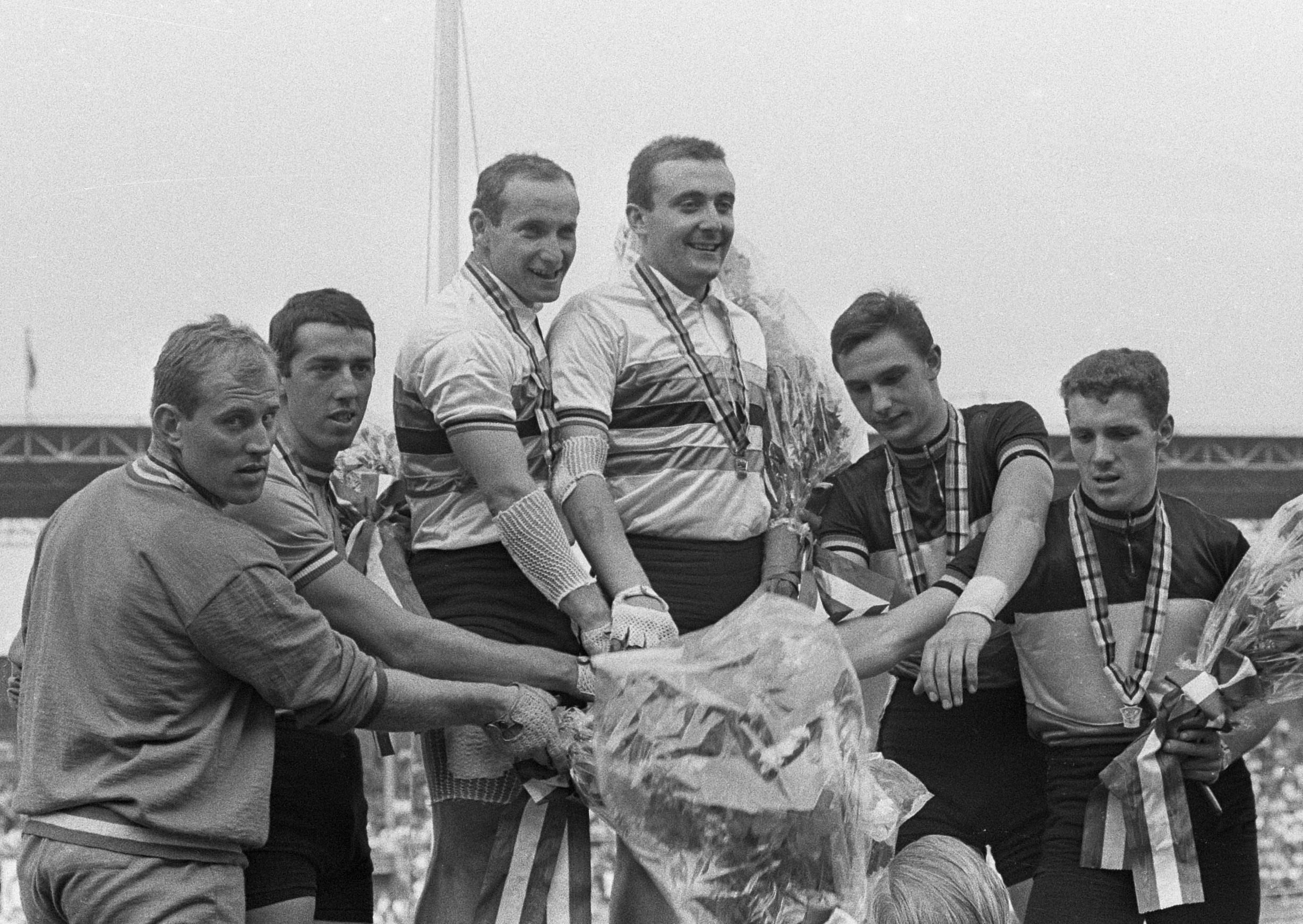 WK Wielrennen op de baan Amsterdam. Ceremonie tandem. 1 Italie, 2 Frankrijk, 3 Belgie